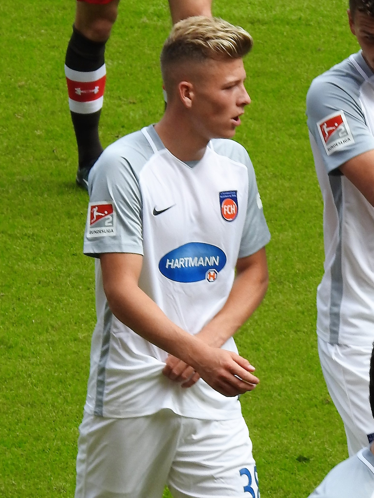 Tim Skarke Heidenheim